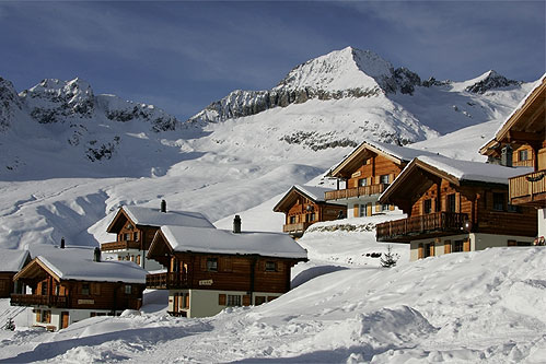 Belalp